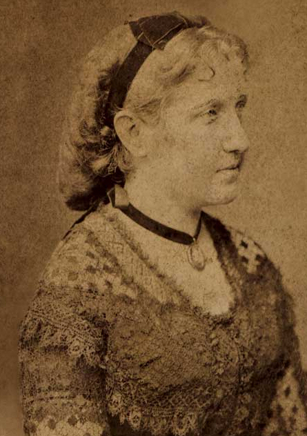 Princess Isabel of Brazil. (Rio de Janeiro, 1866)A Princesa Isabel, do Brasil.